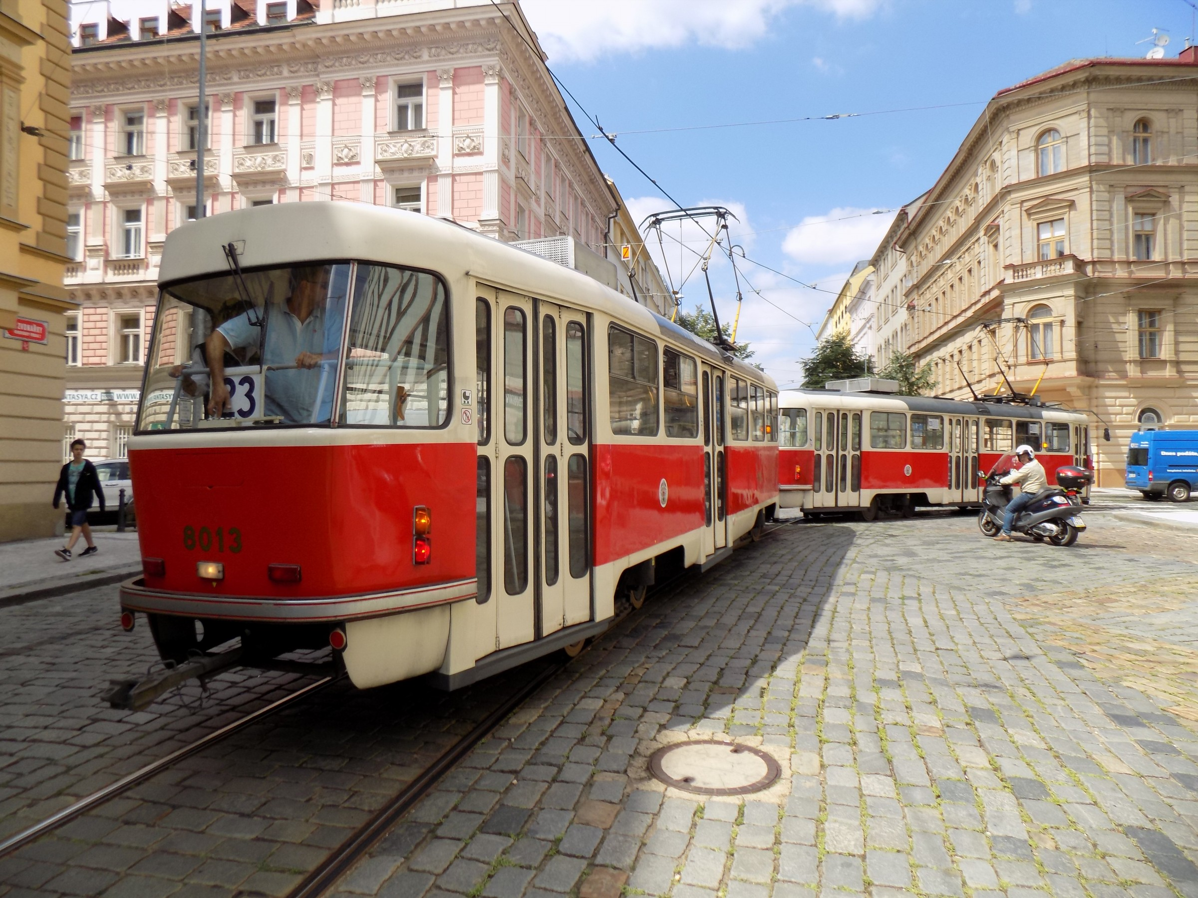 Tolató 23-as jelzésű Tatra T3-as villamos a Zvonařka végállomásnál Prágában